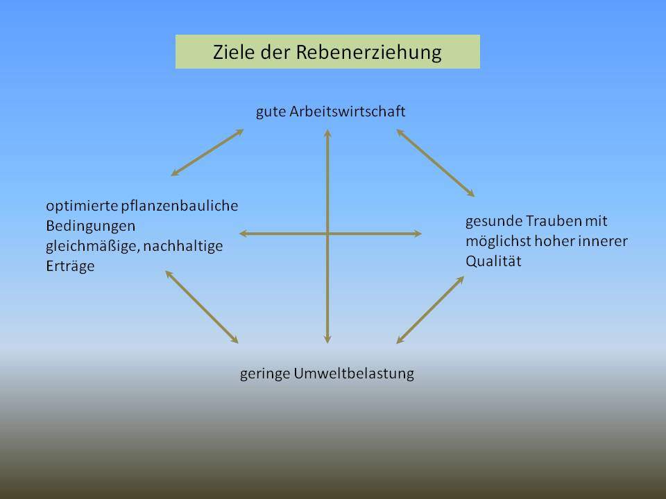 Ziele der Reberziehung - Übersicht